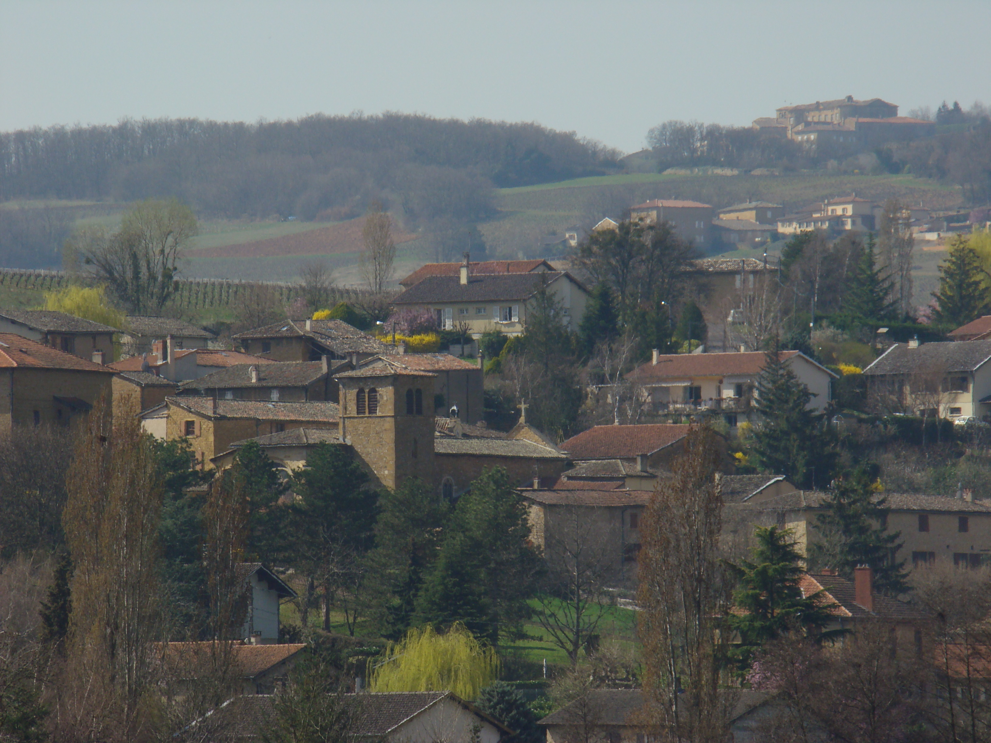 Pouilly le Monial vu de la voie du tacot